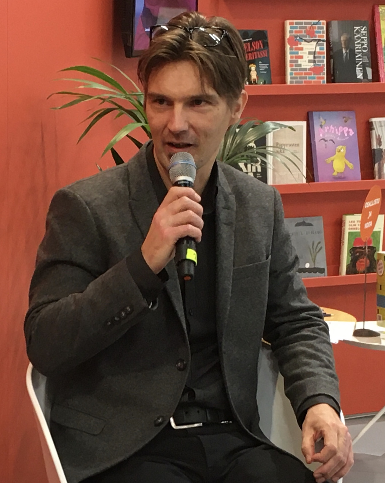 Kirjailija J.P. Laitinen